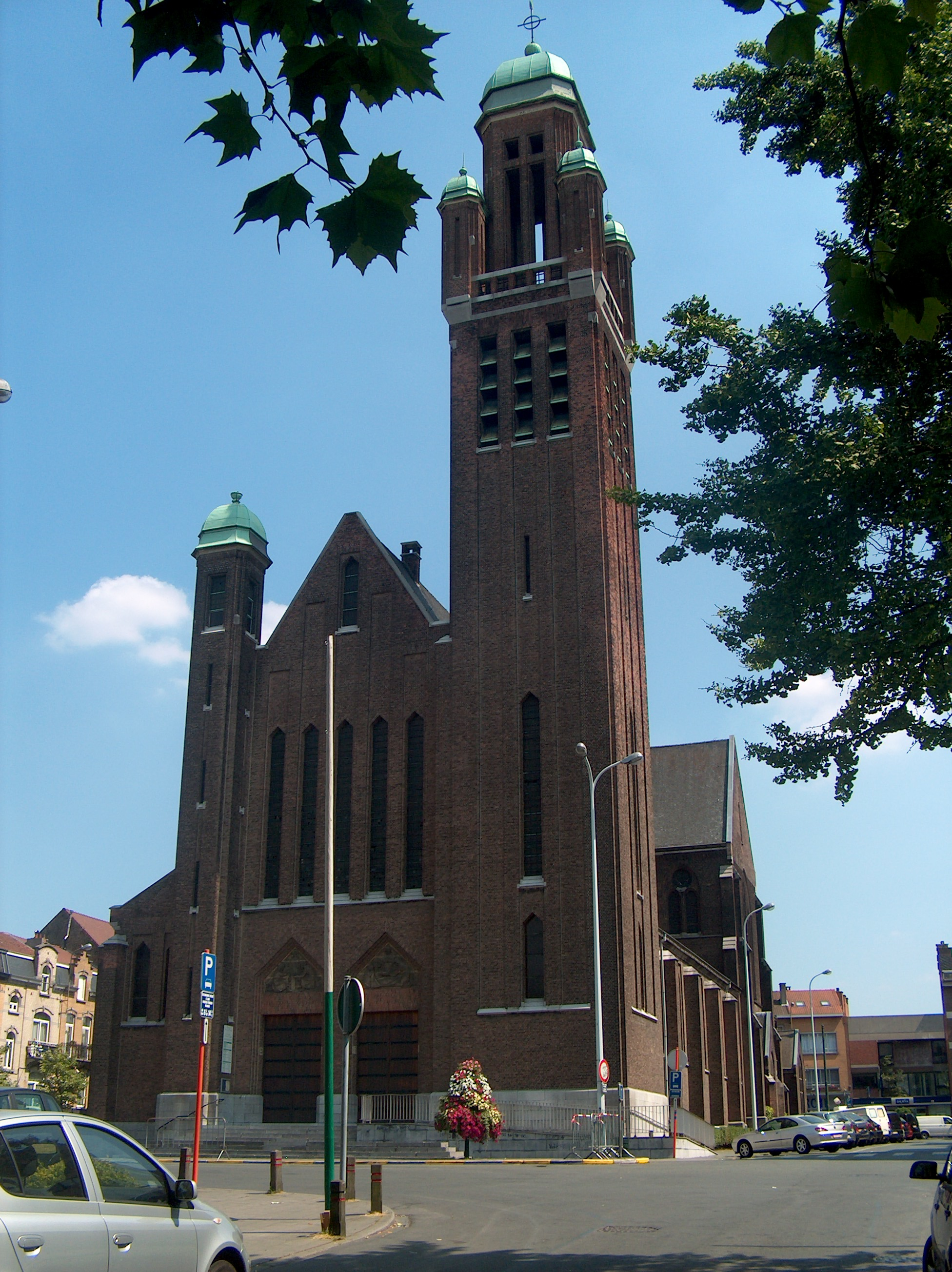 L'église de la Sainte-Famille à Schaerbeek, Bruxelles, Belgique.